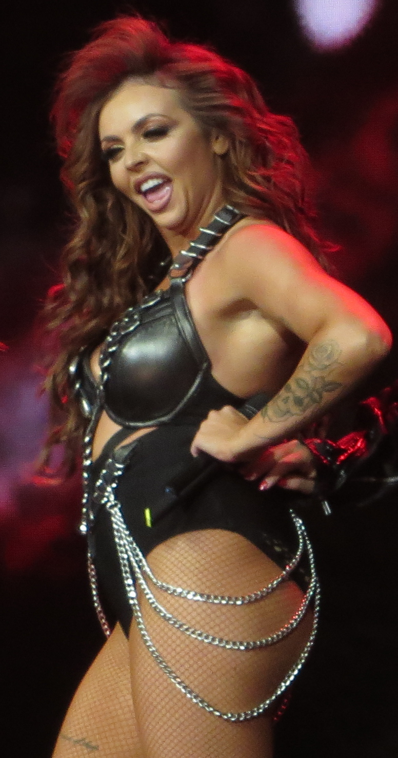 Little Mix 5